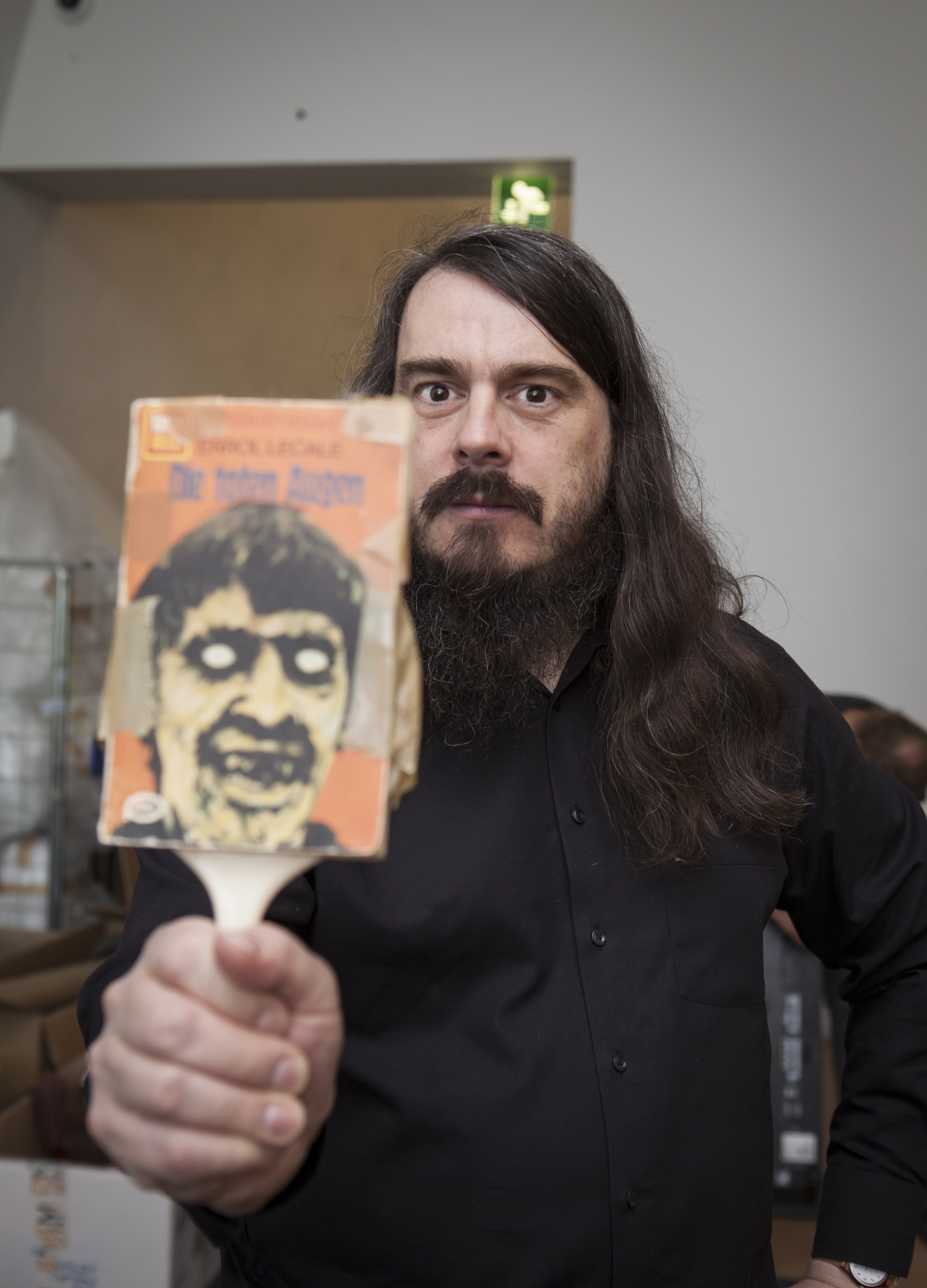 Kiasma; Eri mieltä, Nykytaiteen toisinajattelijoita, 09.10.2015 - 20.03.2016Jonathan Meeses. 1970 Tokio, Japani. Asuu Berliinissä.b. 1970 Tokyo, Japan. Lives and works in BerlinHIPPOTHALAMUS FANCY´S PHARA(O)BYSSOZ(WALK LIKE A MEESYPTION, ADAGOO MI ON)2015sekatekniikkamixed mediavaihtelevat mitatdimensions variableCourtesy of the artistkuva / Photo:Kansallisgalleria / Pirje MykkänenFinlands Nationalgalleri / Pirje MykkänenFinnish National Gallery / Pirje Mykkänen